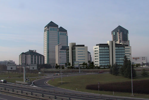 Vimercate (provincia di Monza e della Brianza); nuovo quartiere "Le Torri Bianche"